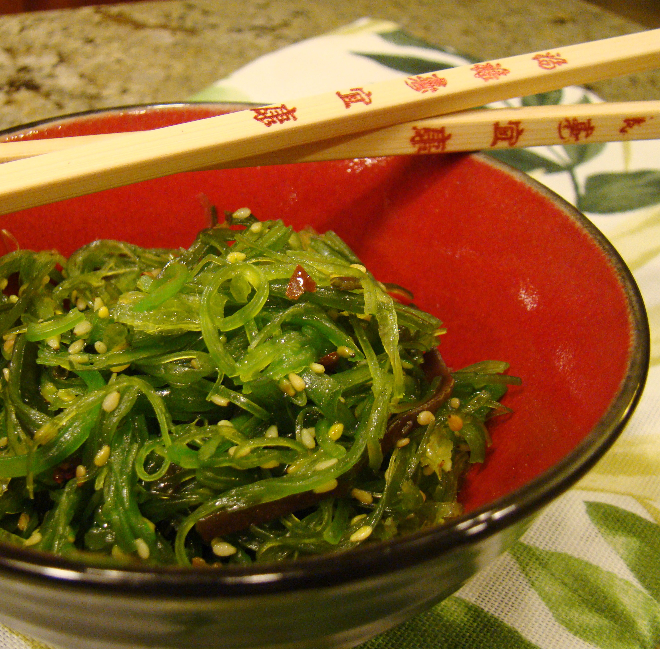 Seaweed Salad